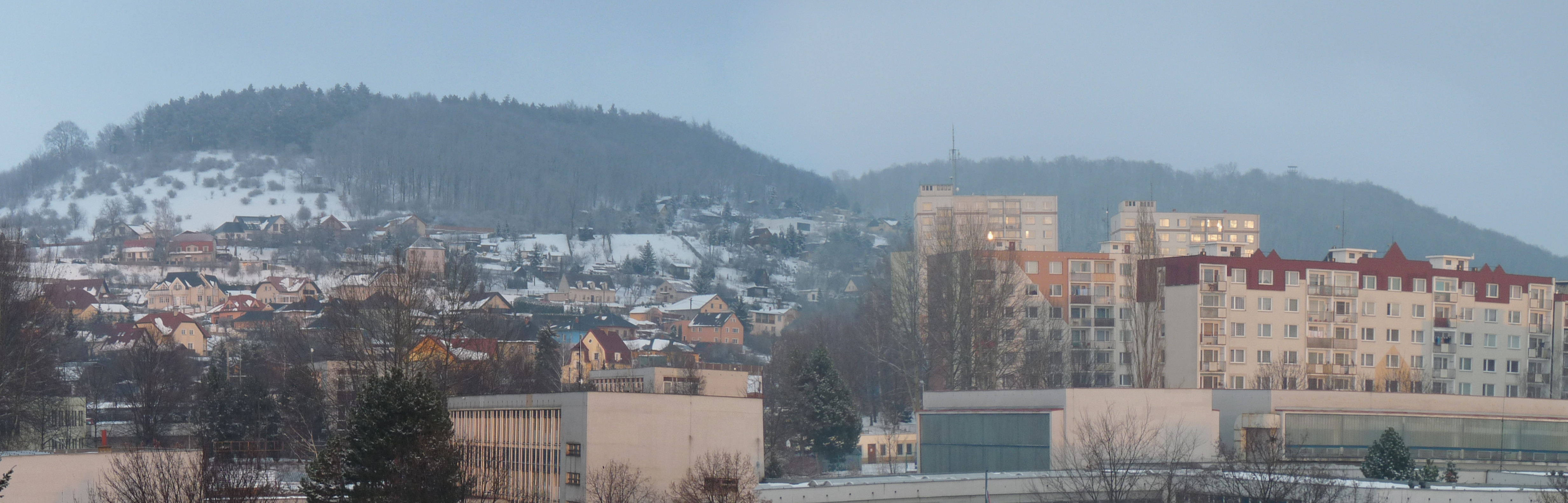 Kočkov - Erbenka